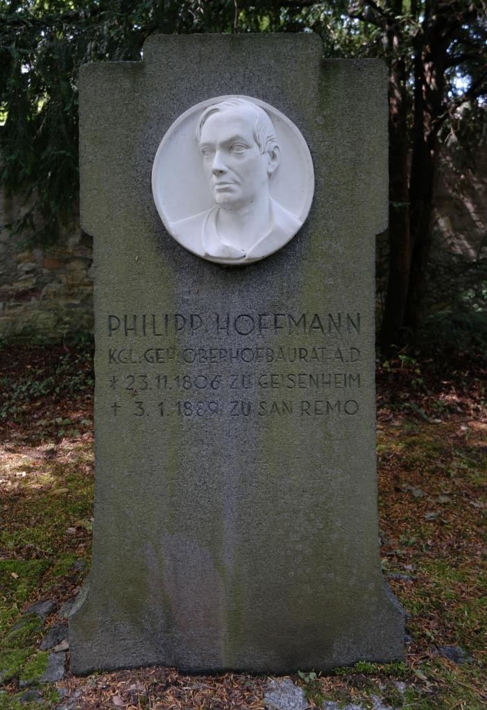 Grab des Architekten und Stadtbaumeisters Philipp Hoffmann, 1806-1889, auf dem Alten Friedhof in Wiesbaden